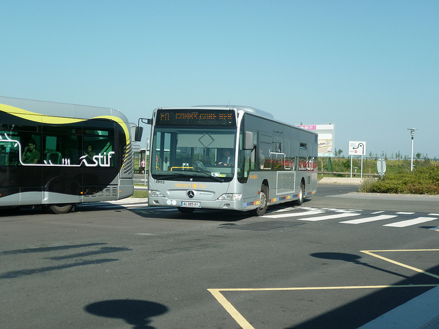 Nouveau Citaro II Facelift du réseau Sénart Bus et Créalis Neo 12 de la ligne TZEN 1 à la Gare RER de Lieusaint-Moissy